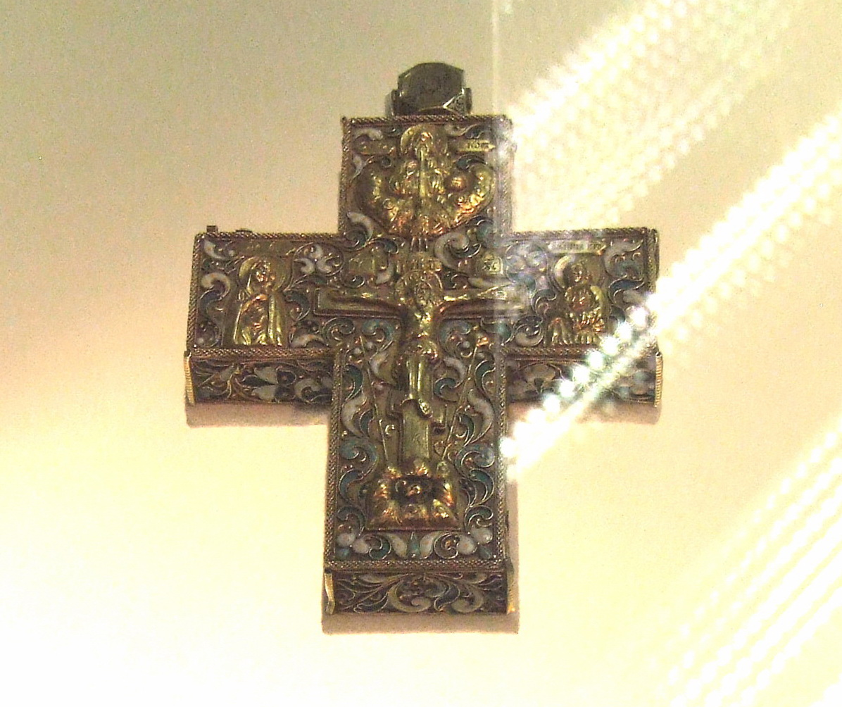 КРЕСТ НАПЕРСНЫЙ Первая половина XVII века (1606–1619 ?) Золото, дерево; перегородчатая эмаль 15,9 х 10,6 х 1,8 Поступил в 1956 году На обороте – гравированная надпись XIX века, согласно которой патриарх Филарет (Федор Никитич Романов), находясь в польском плену, благословил этим крестом боярина А.В. Волынского. Хранился в Александровском дворце в Царском Селе, затем в Павловском дворце-музее ГЭ инв. ЭРП-1303